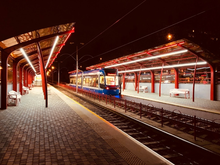 Station of express tram in Kiev